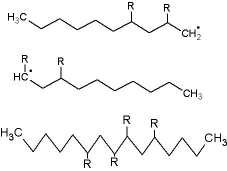 polimerização radicalar